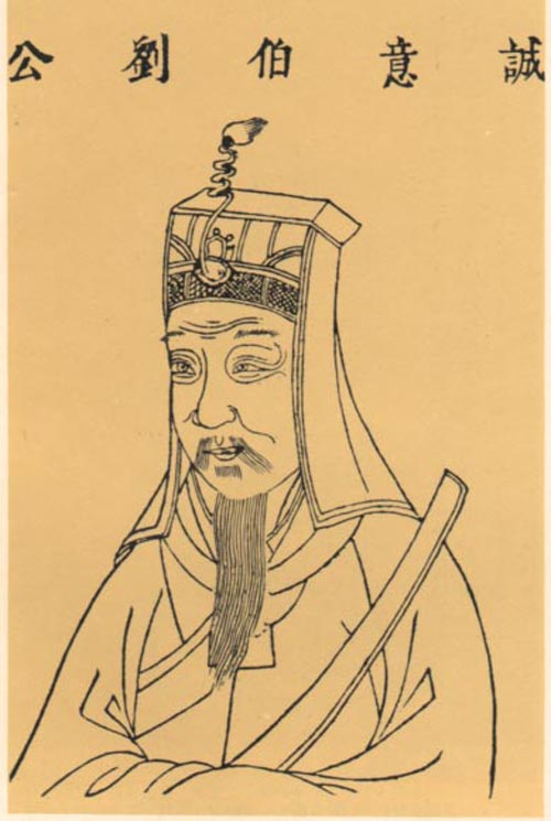 刘基，字伯温，明朝政治人物